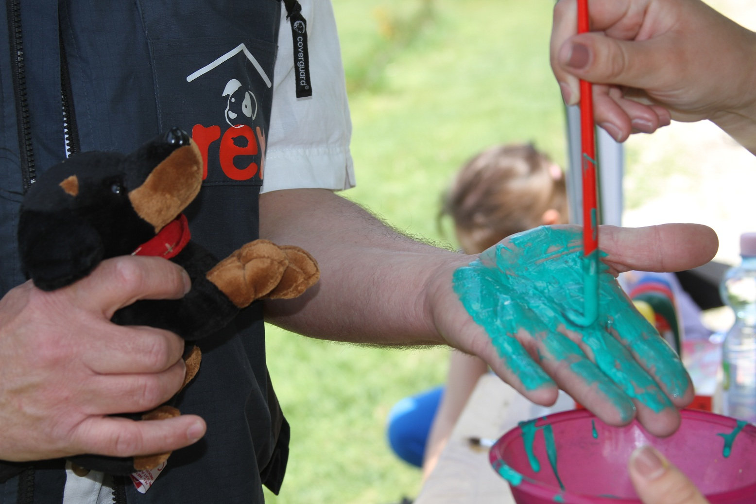 Felelős Állattartás Napja, kéz előkészítése a festésre